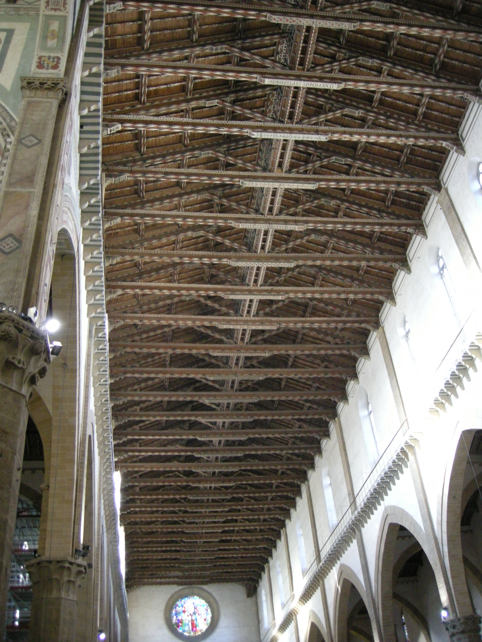 Santa croce, navata, capriate